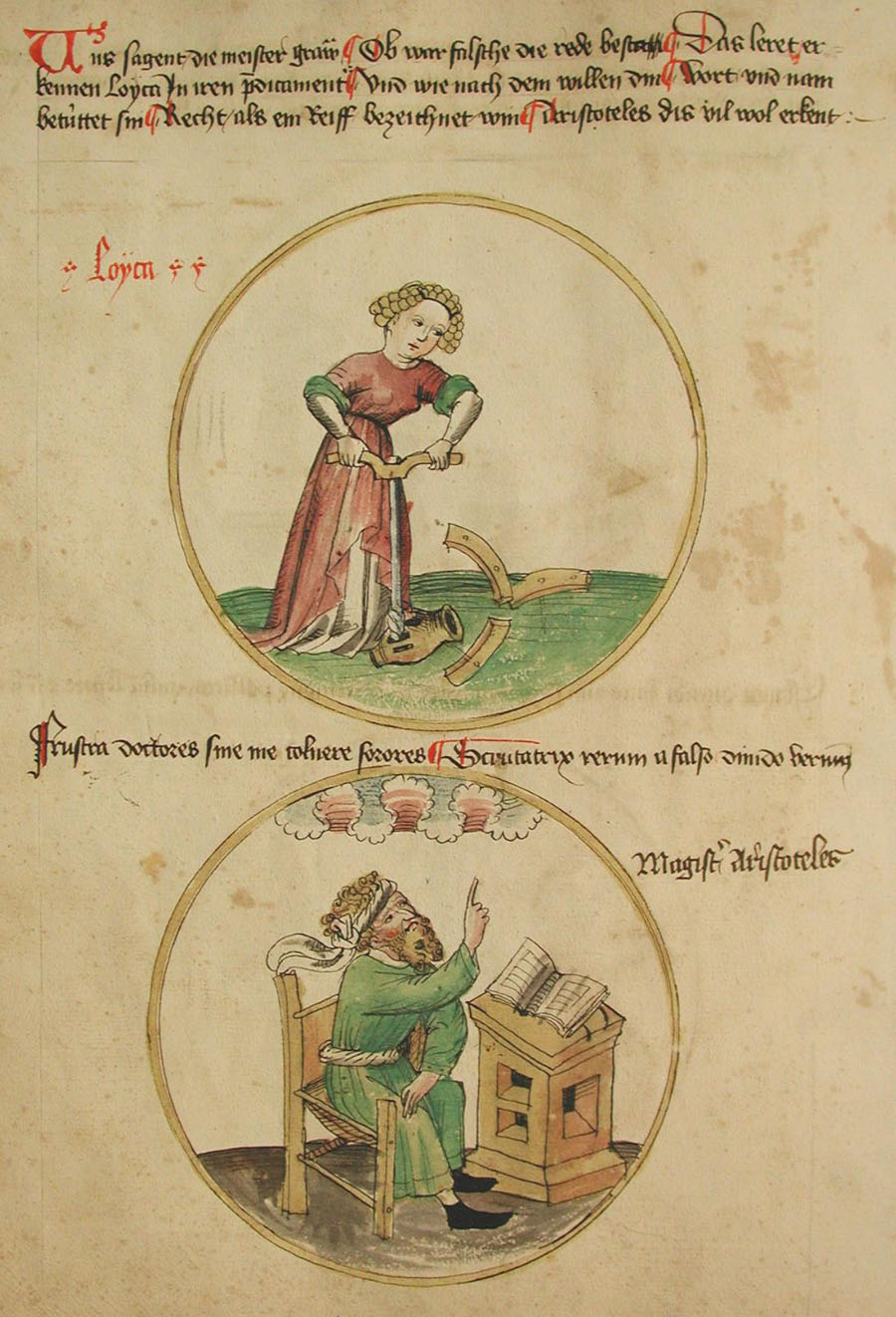 Die sieben freien Künste. Logik und Aristoteles